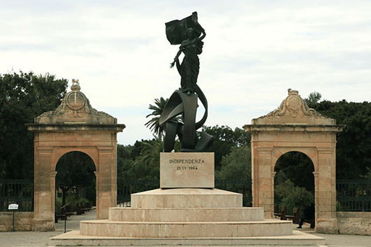 monument de l'indépendance à Floriana